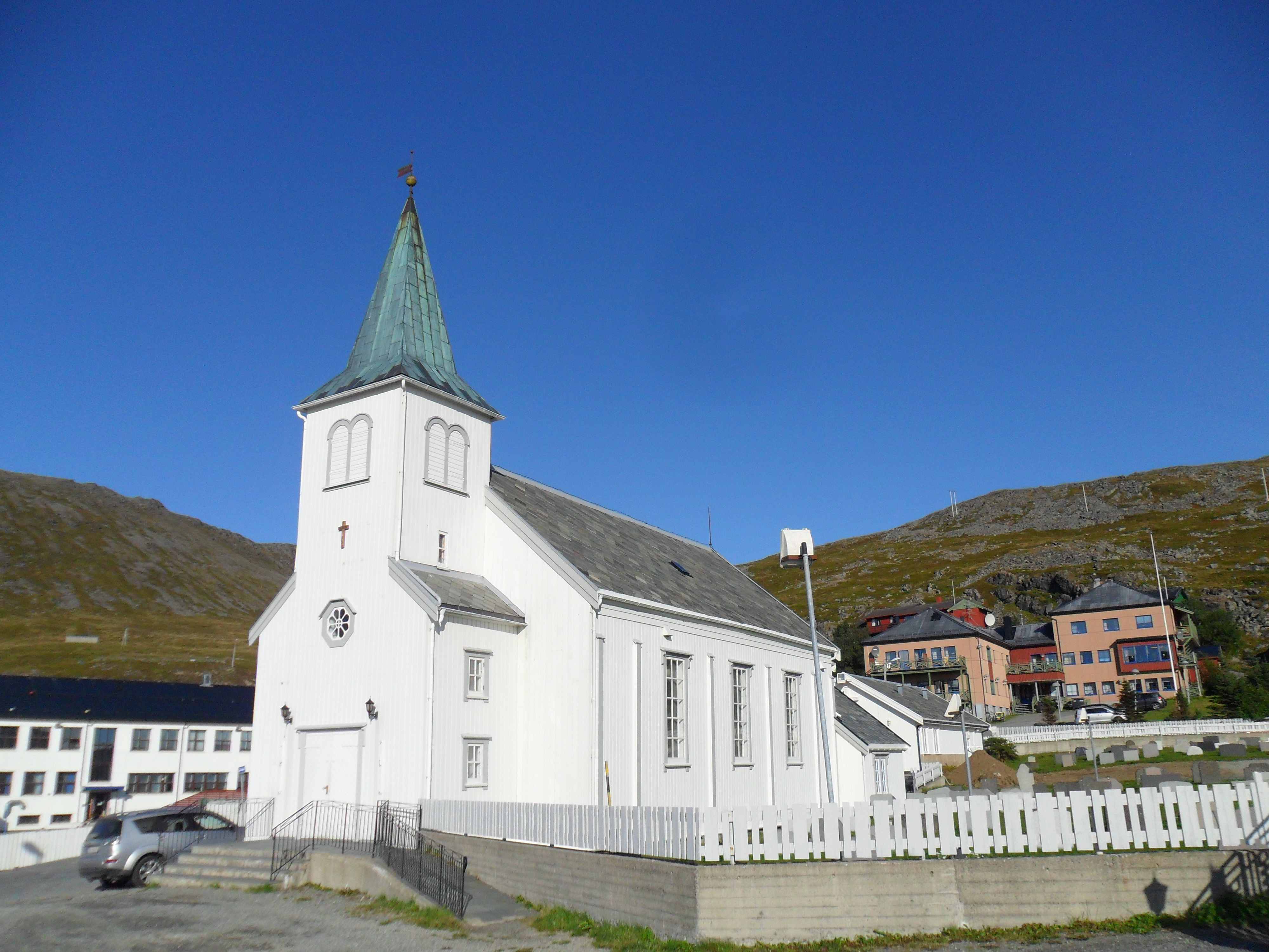 Honningsvåg kirke i Nordkapp kommune, Finnmark. Eneste bygning i Honningsvåg som overlevde 2 verdenskrig.